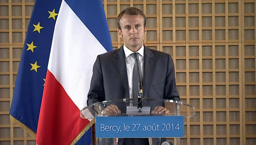 Emmanuel Macron lors de la passation des pouvoirs avec Arnaud Montebourg au ministère de l’économie et des finances le 27 août 2014.